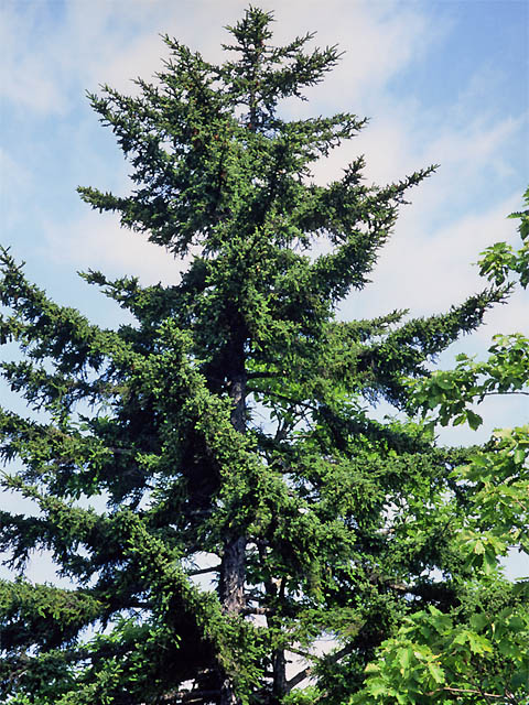 Picea glehnii, en Kawayu, Hokkaido, Japon. アカエゾマツ 北海道川湯温泉にて撮影